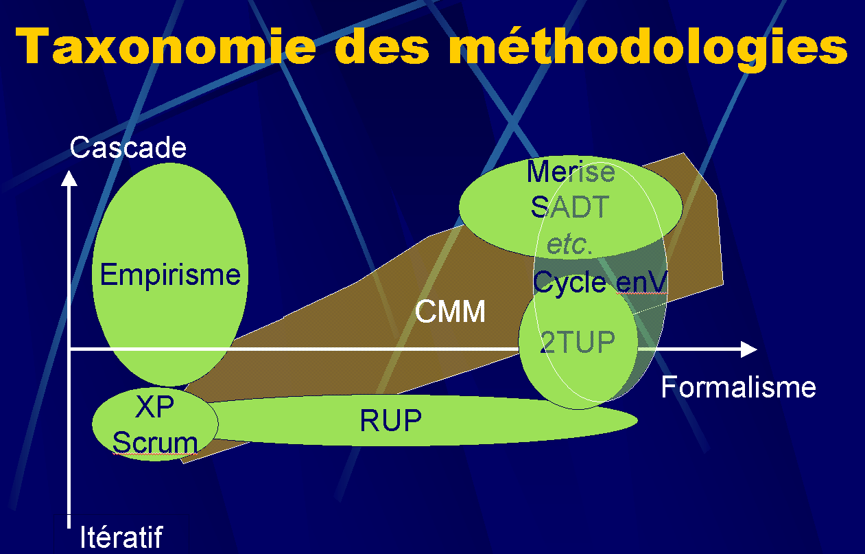 Taxonomie des méthodologies. Dessiné par Christophe.moustier. Elle est présentée dans le cours de gestion de projet disponible sur [1]